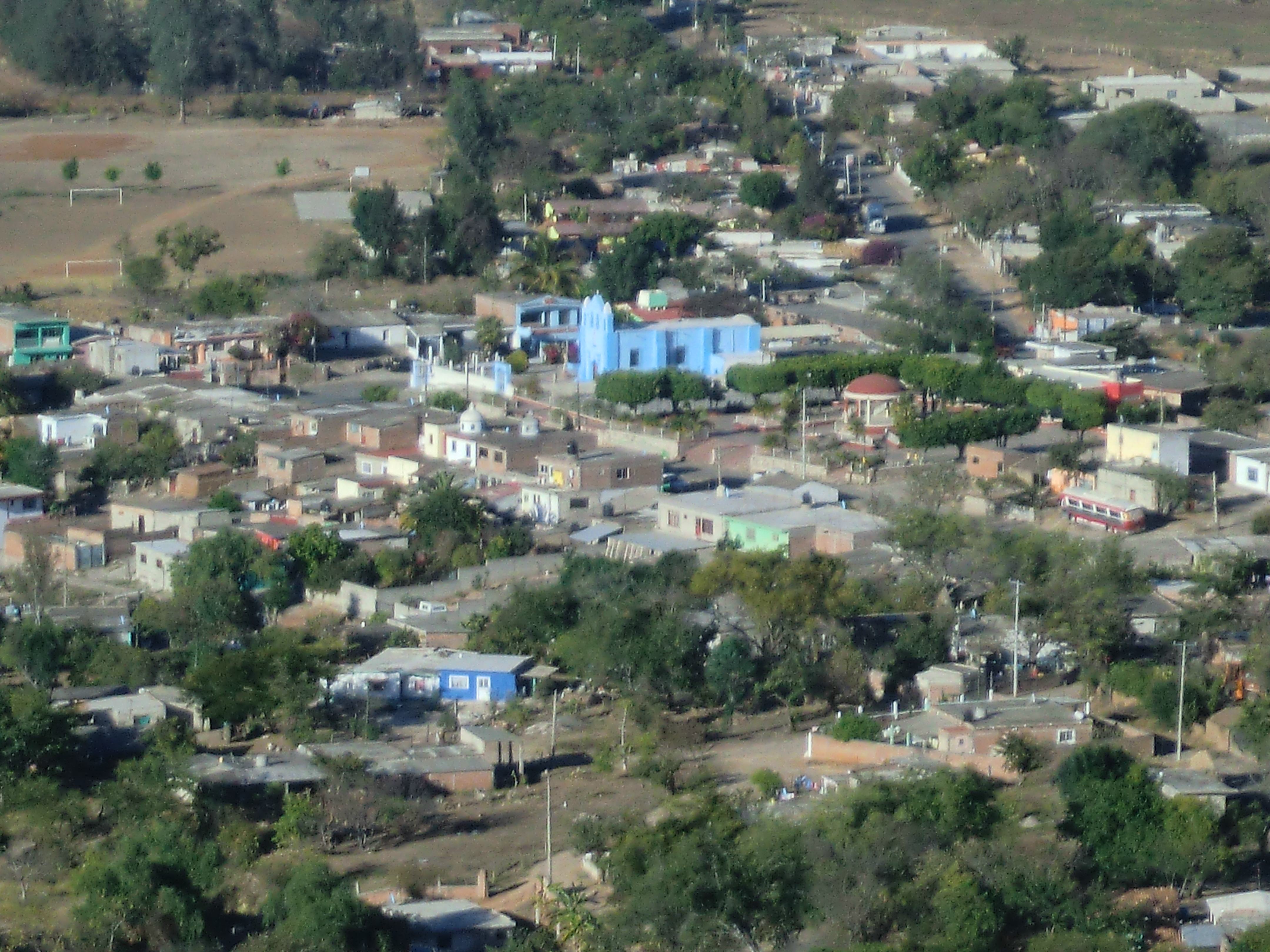 vista panoramica